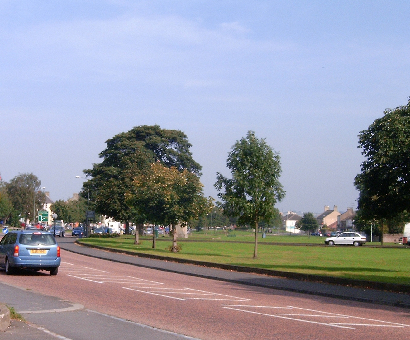 West Auckland, Co Durham, England